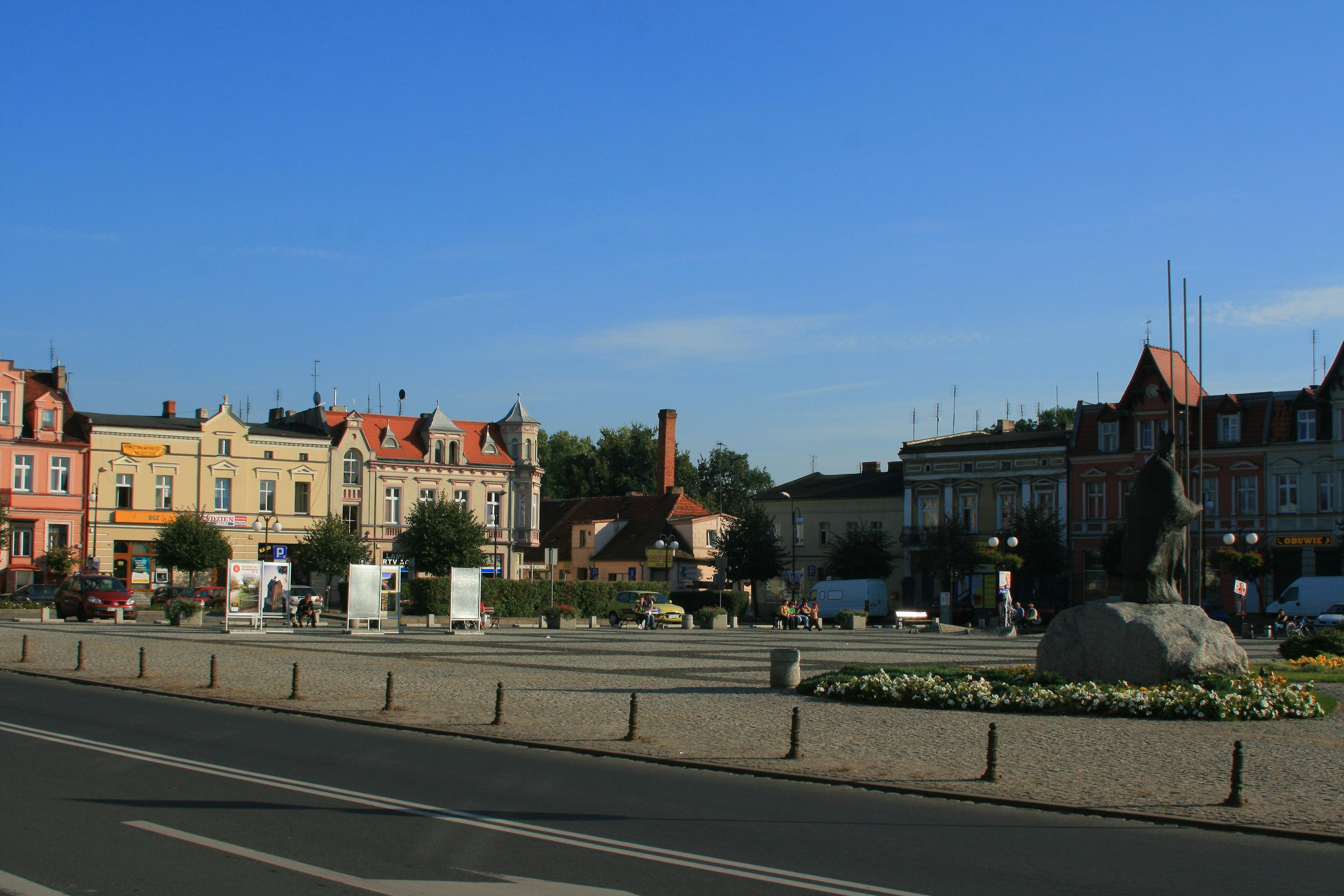 Oborniki, Poland